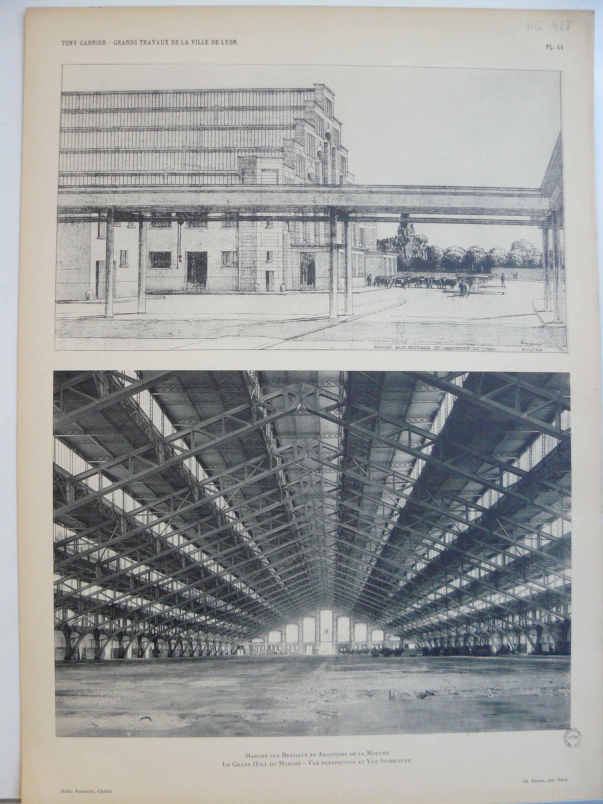 Marché aux bestiaux et abattoirs de La Mouche : le grand hall du marché (80 m x 210 m), vue perspective et vue intérieure par Tony Garnier (pl. 44) du recueil "Les grands travaux de la ville de Lyon [Livre] : études, projets et travaux exécutés (hôpitaux, écoles, postes, abattoirs, habitations en commun, stade, etc.)" en 1921